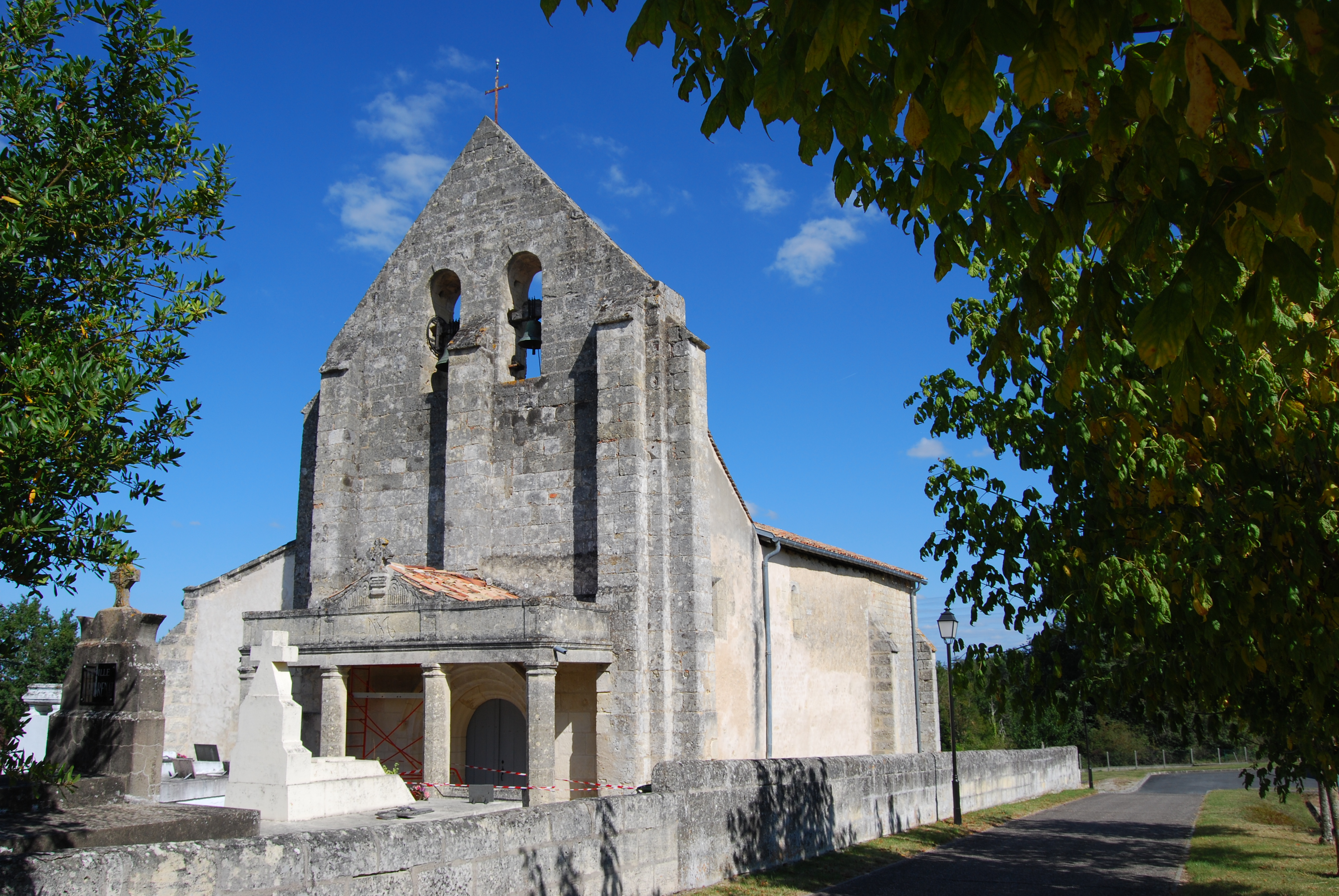 Le Pout Eglise St Martin